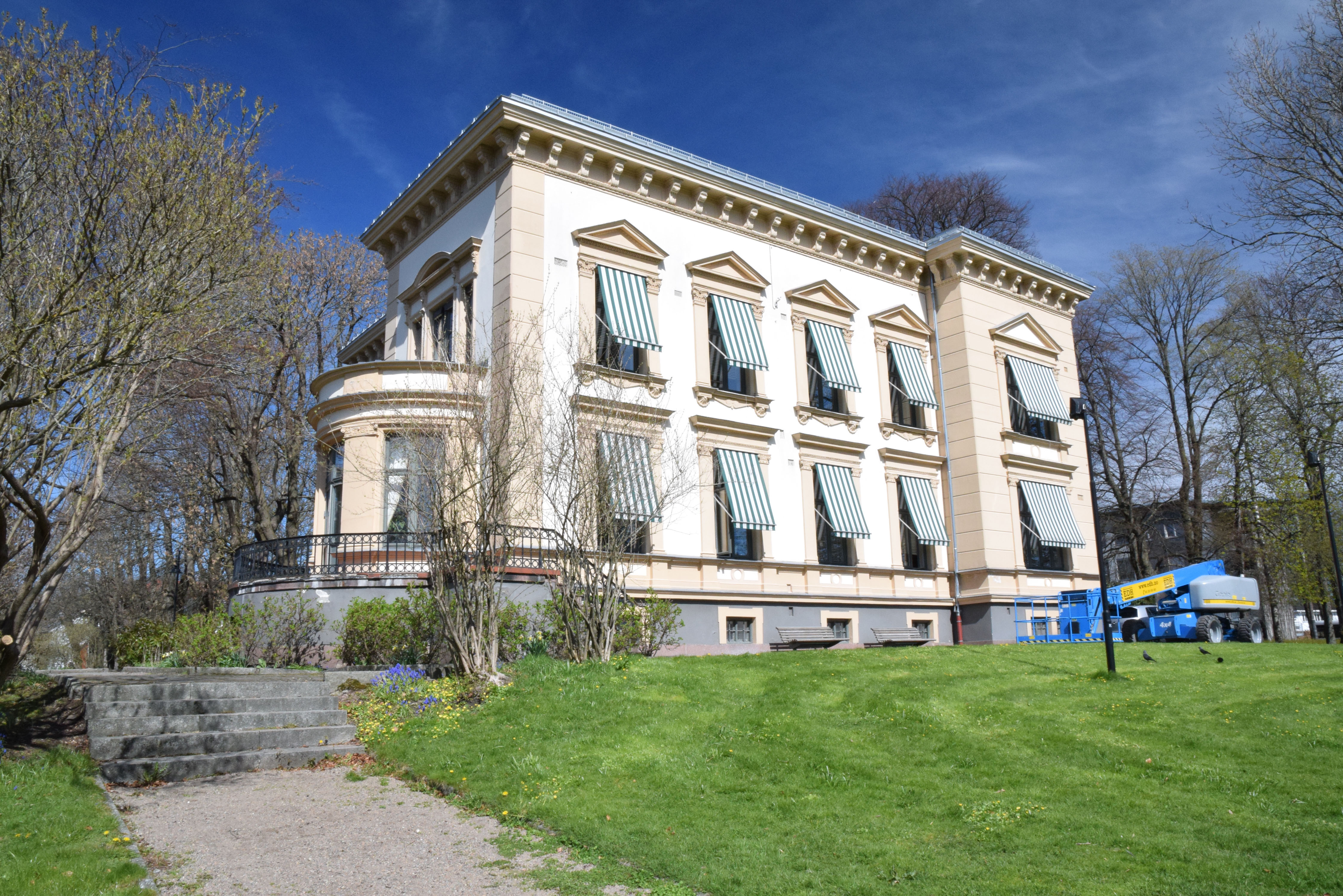 Gunnarsbøparken med Gunnarsbø, sydveggen